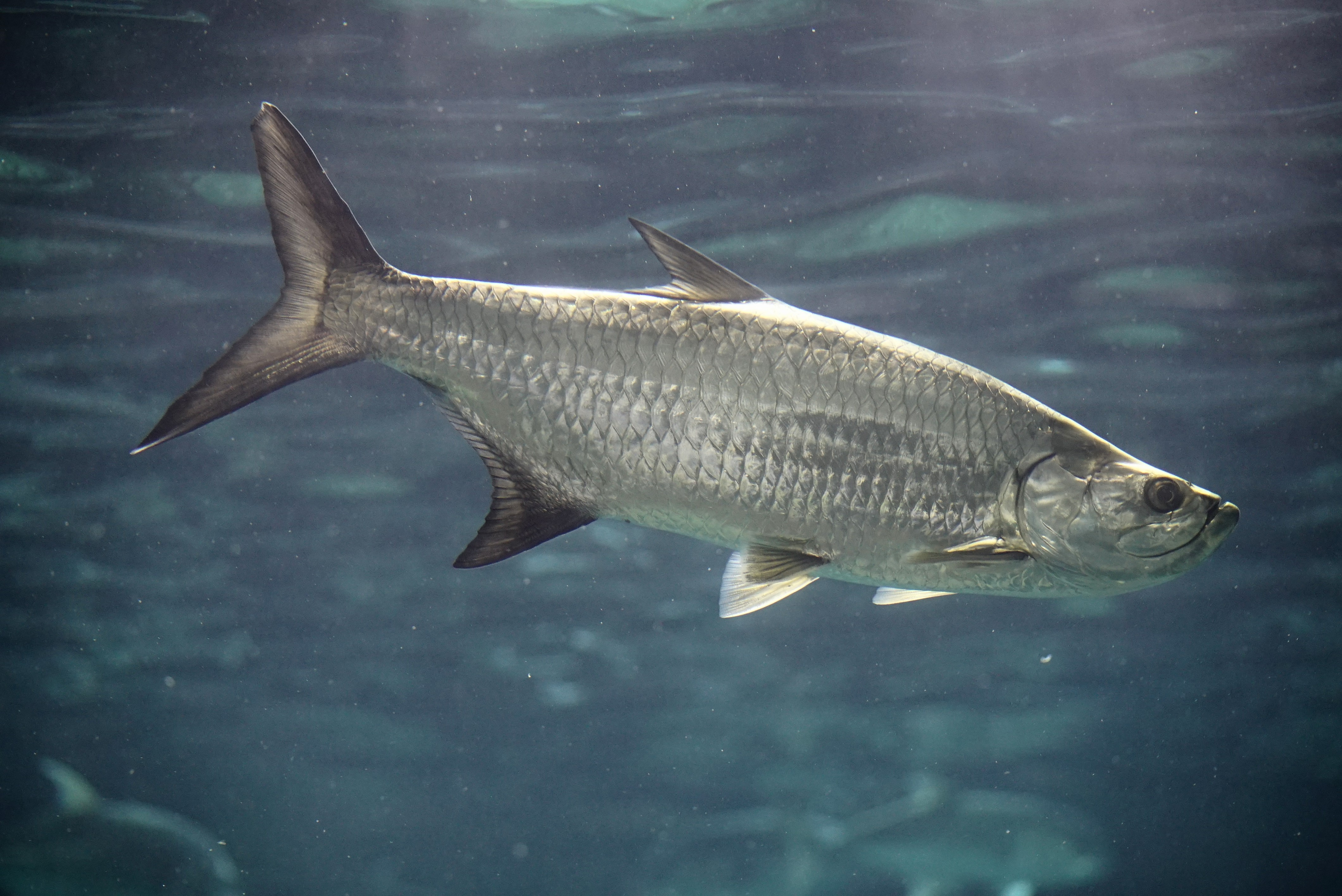 Megalops_atlanticus_by_DaijuAzuma.JPG ターポン Tarpon Domain: Eukaryota • Regnum: Animalia • Phylum: Chordata • Subphylum: Vertebrata • Infraphylum: Gnathostomata • Superclassis: Osteichthyes • Classis: Actinopterygii • Ordo: Elopiformes • Familia: Megalopidae • Genus: Megalops Wikispecies has an entry on: Megalops atlanticus. Species Megalops atlanticus (Valenciennes in Cuvier and Valenciennes, 1847) 動物界 脊索動物門 条鰭綱 カライワシ目 イセゴイ科 イセゴイ属 Location: Suma Aqualife Park, Kobe, Japan Other photos: NCBI Taxonomy ID:7932 ITIS link: Megalops atlanticus (Valenciennes in Cuvier and Valenciennes, 1847) EOL link: Megalops atlanticus uBio search link: Megalops atlanticus Licensing